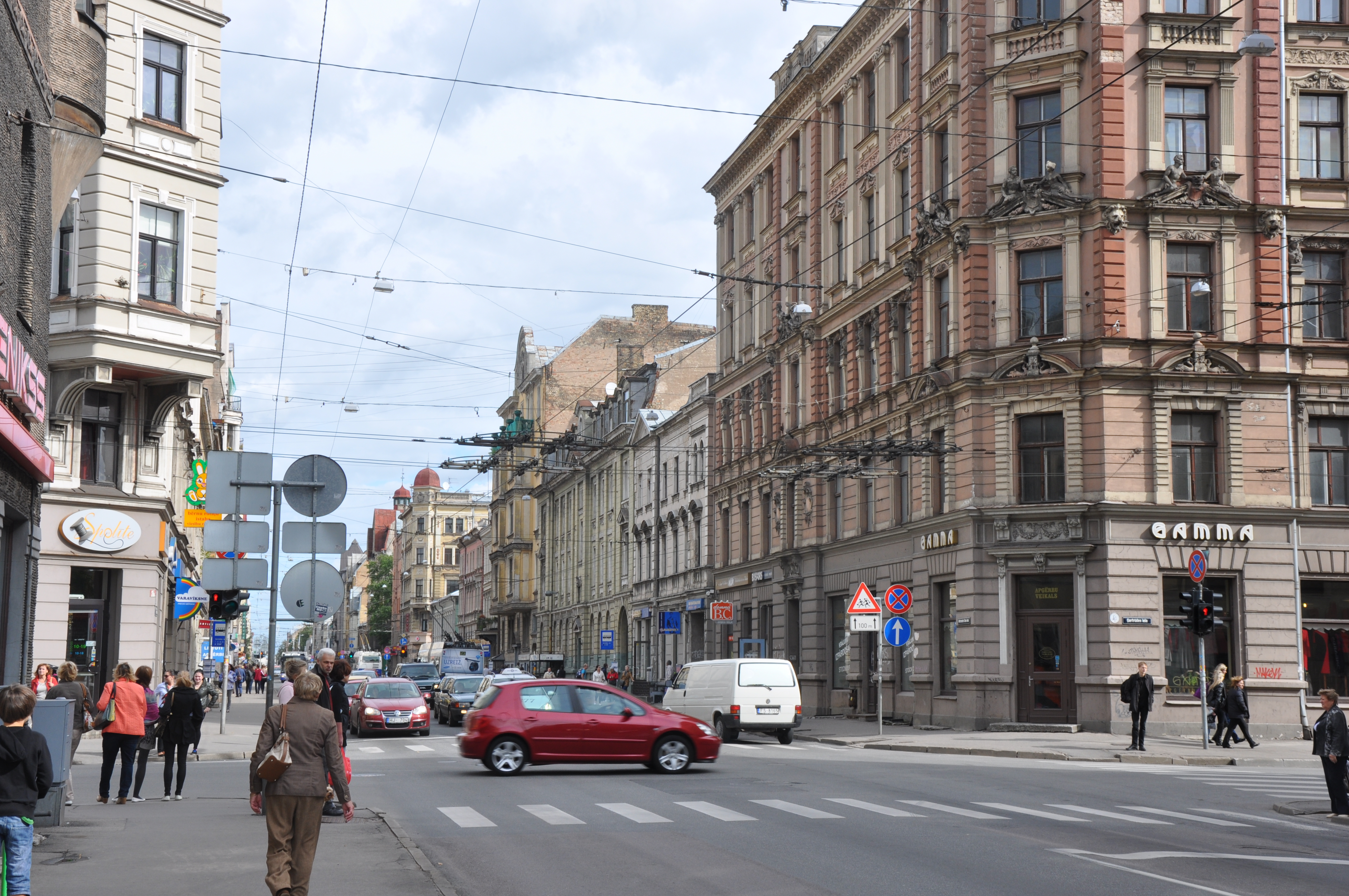 Aleksandra Čaka ielas un Ģertrūdes ielas krustojums, Rīga, Latvia